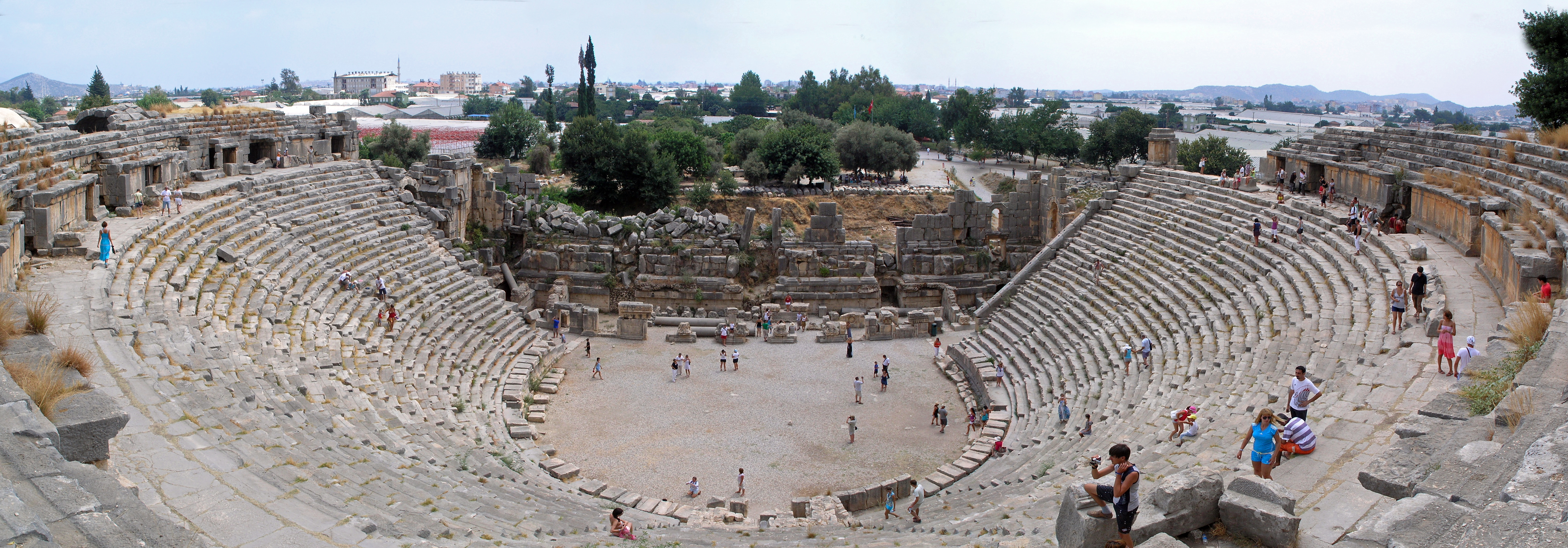 Турция, Демре, панорама античного театра в Мире Ликийской